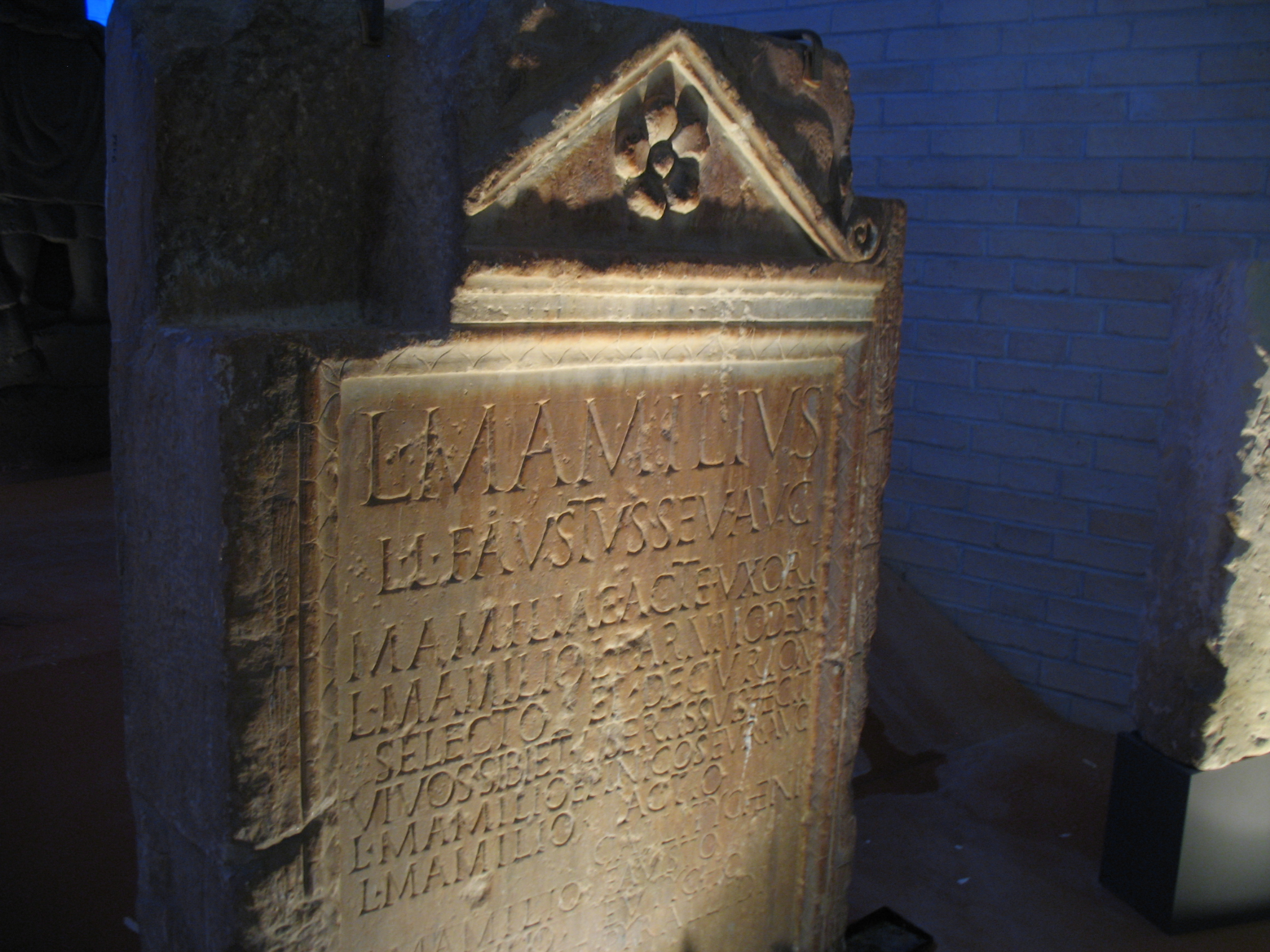 Stele funeraria nel Museo archeologico La Civitella di Chieti. CIL IX 3023: L(ucius) Mamilius / L(uci) l(ibertus) Faustus sev(ir) Aug(ustalis) / Mamiliae Acte uxori / L(ucio) Mamilio L(uci) f(ilio) Arn(ensi) Modesto / selecto et decurioni / viv s sibi et libertis suis fecit / L(ucio) Mamilio Epinico sevir(o) Aug(ustali) / L(ucio) Mamilio Actio / Callitycheni / L(ucio) Mamilio Fausto / L(ucio) Mamilio Eutycho / Mamiliae Pyrallidi